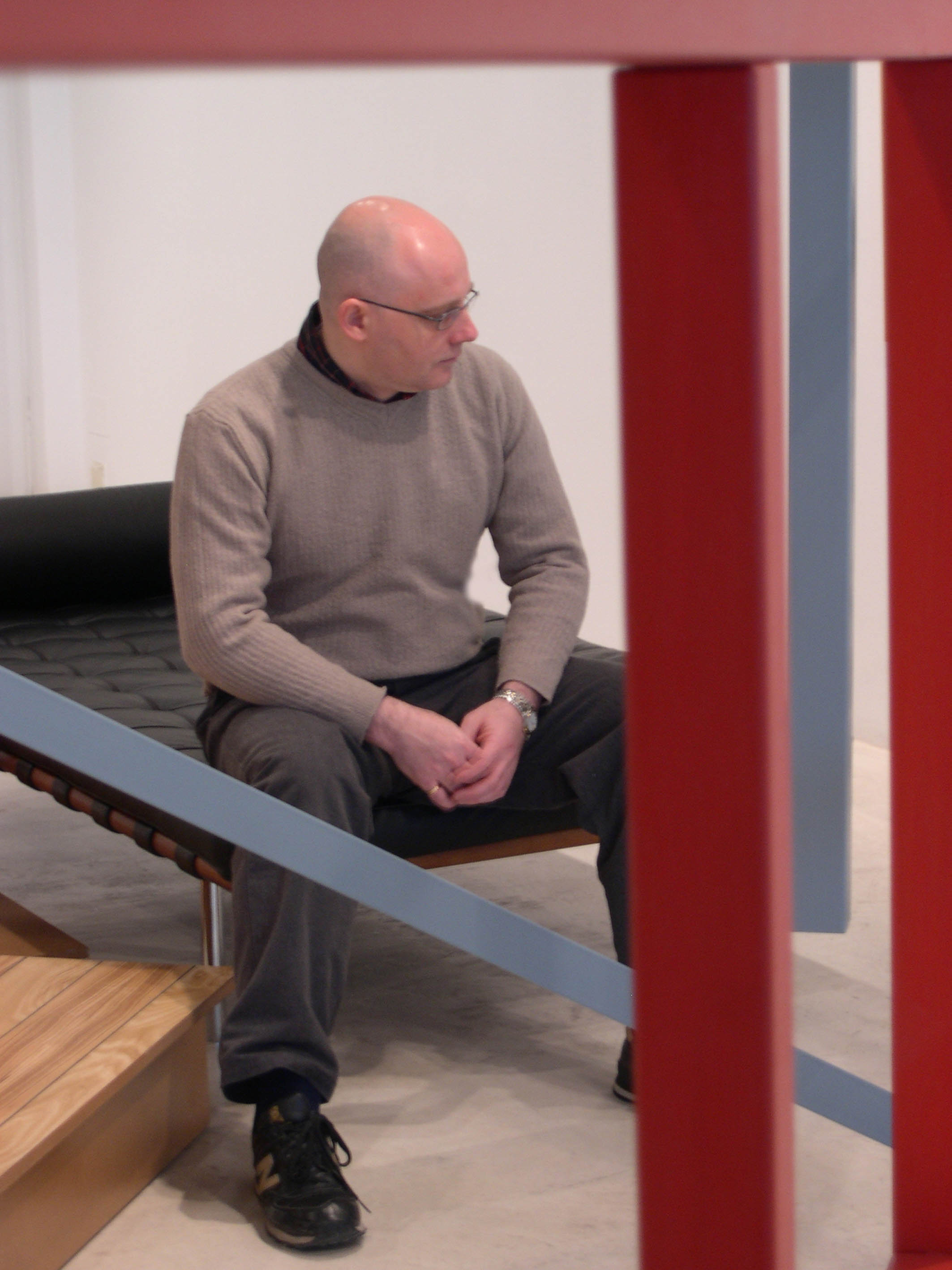 Retrato del artista Txomin Badiola